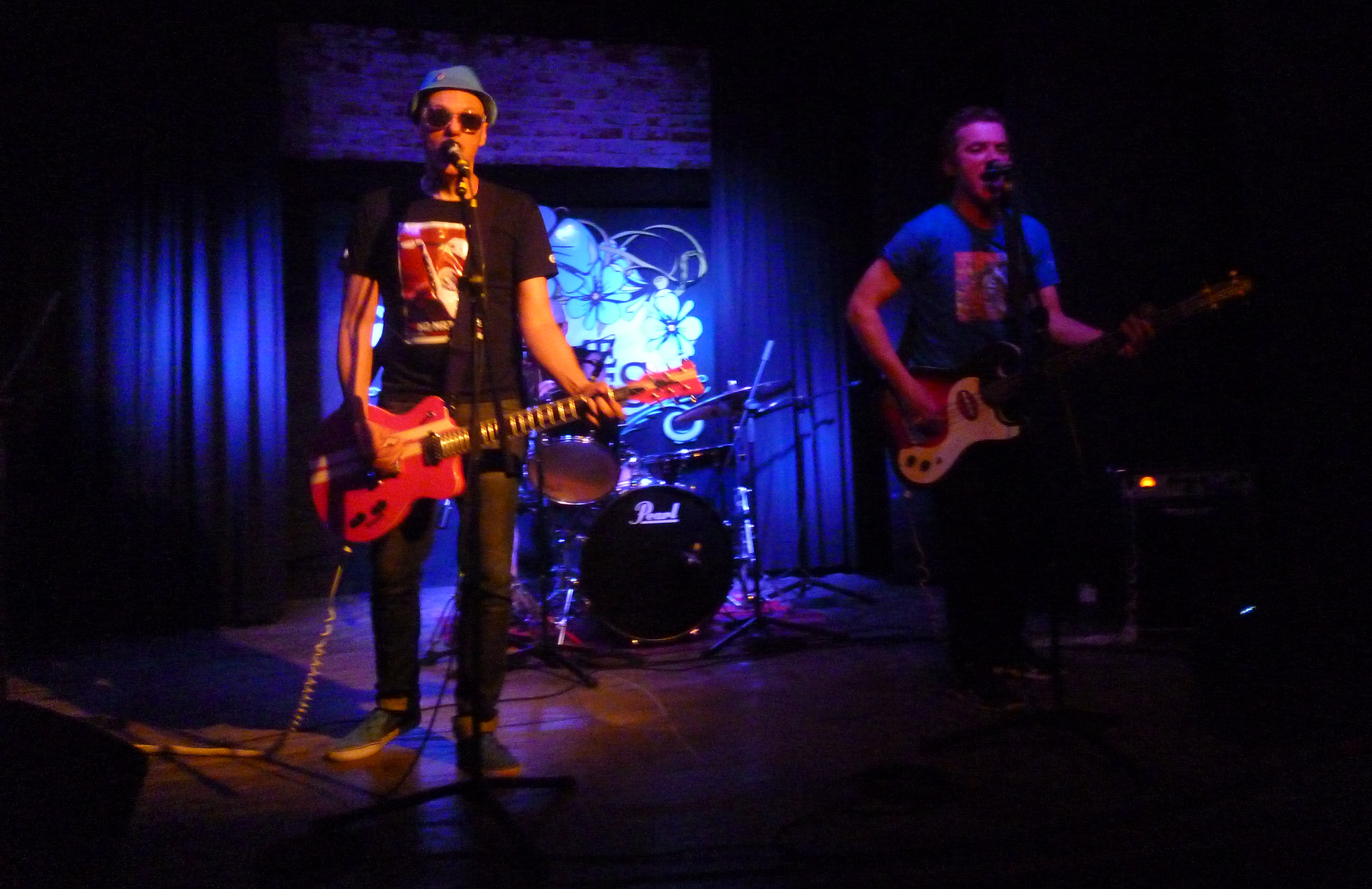 Banda No Mataras tocando en "No me olvides", Lomas de Zamora. Foto 5 de diciembre de 2013.